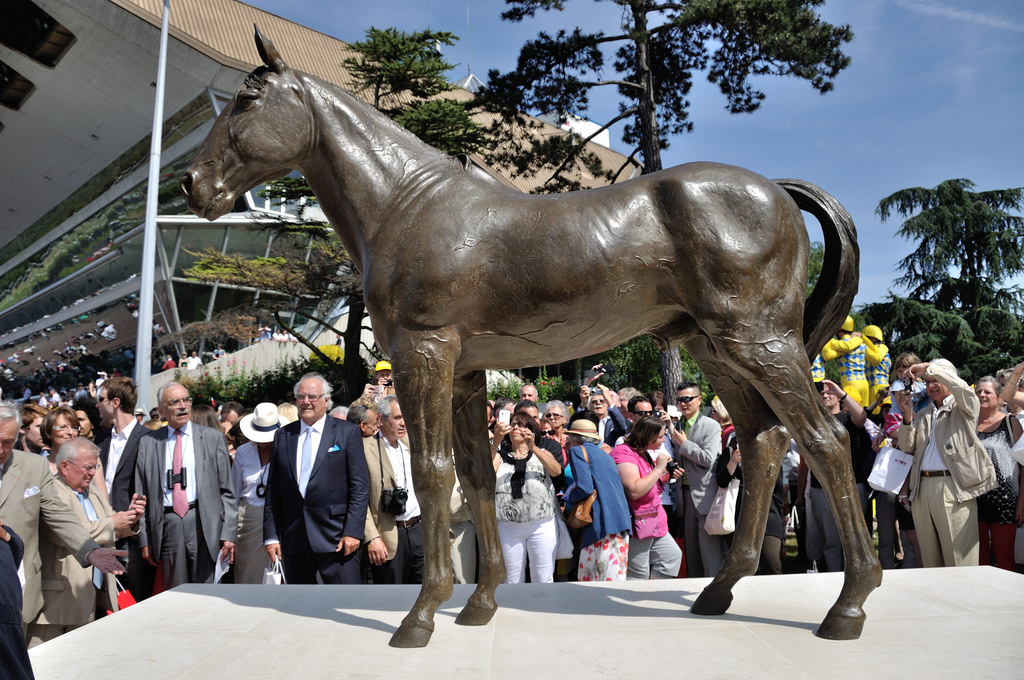 Inauguration de la statue d'Ourasi